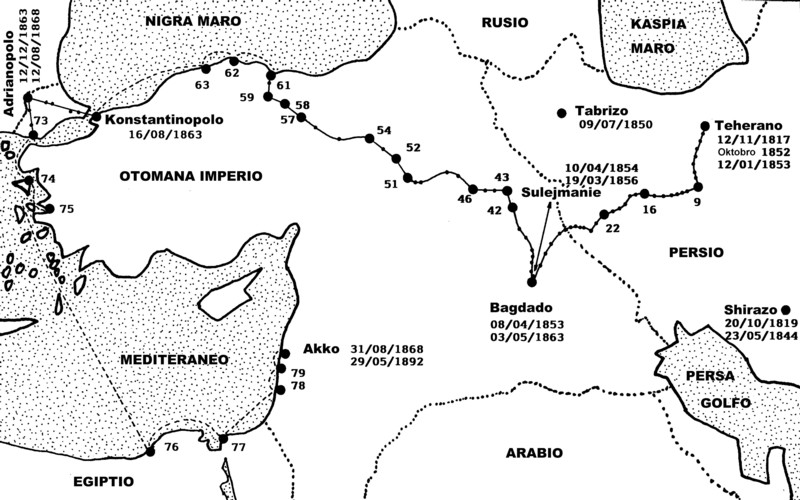 Mapo de la sinsekvaj ekziloj de Bahá'u'lláh, kiun Eric.Coffinet desegnis laŭ mapo verkita en 1968 de S-ro M. Muḥammad Labib por la Bahaa Kunveno de Palermo. La mapo estas detale komentita en la paĝo Ekzilo de Bahá'u'lláh. Kategorio:Bahaismo